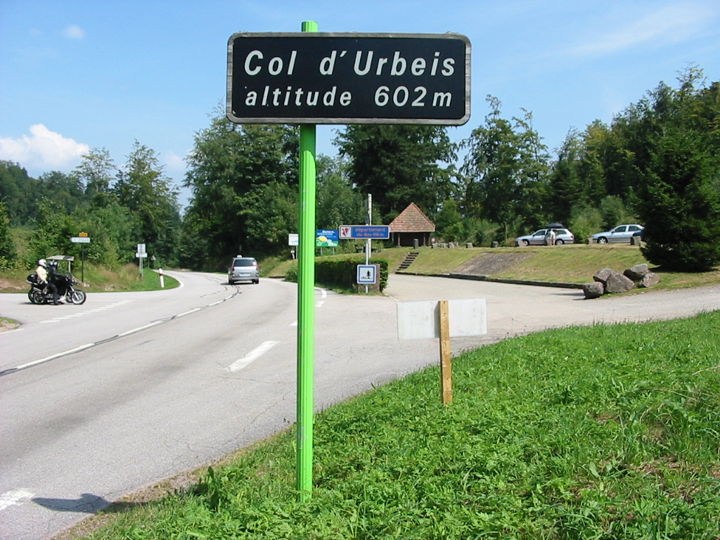 Le col d'Urbeis dans le massif des Vosges.